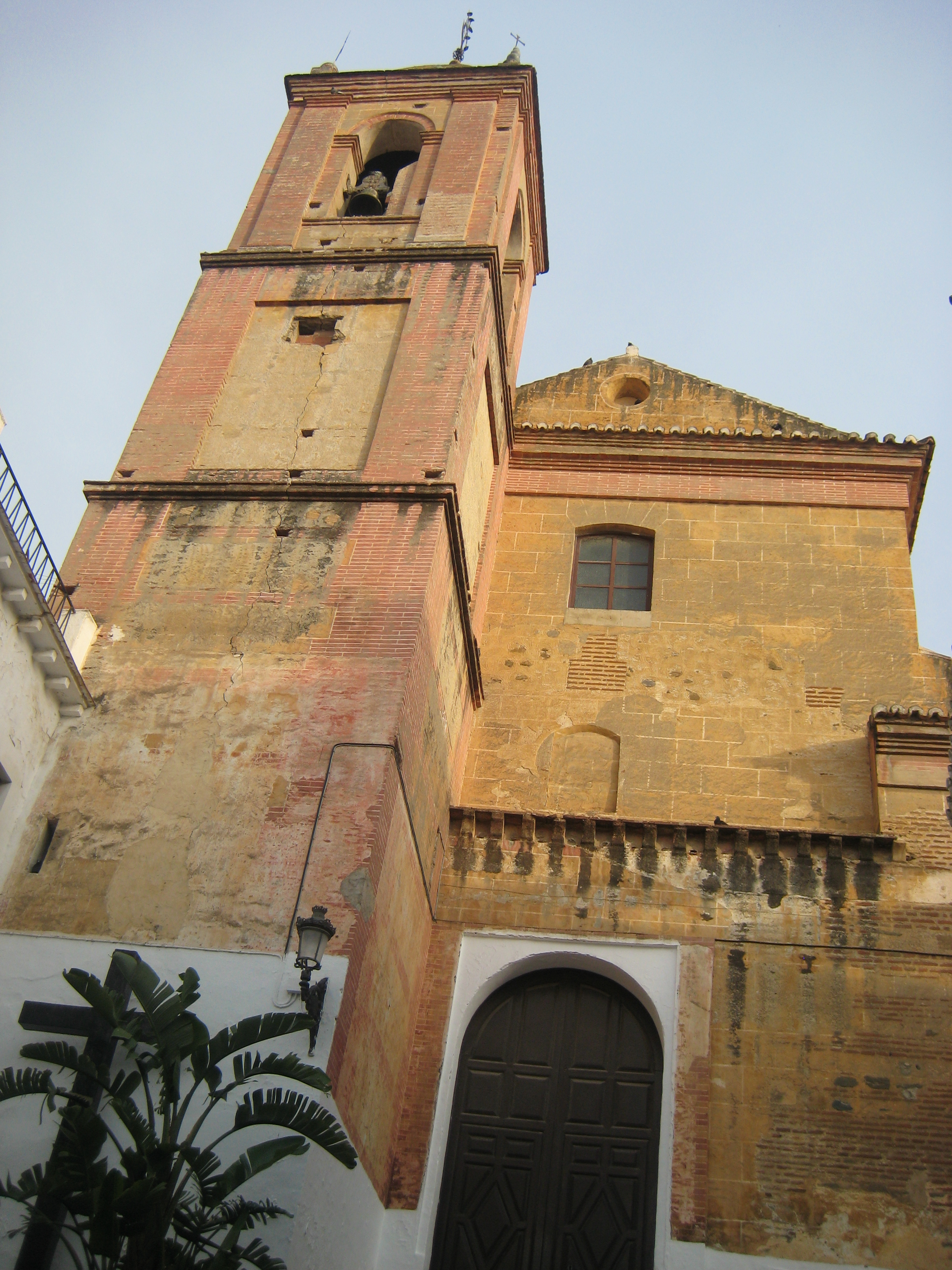 Iglesia de Nuestra Señora de la Encarnación, Torrox, Málaga, Spain